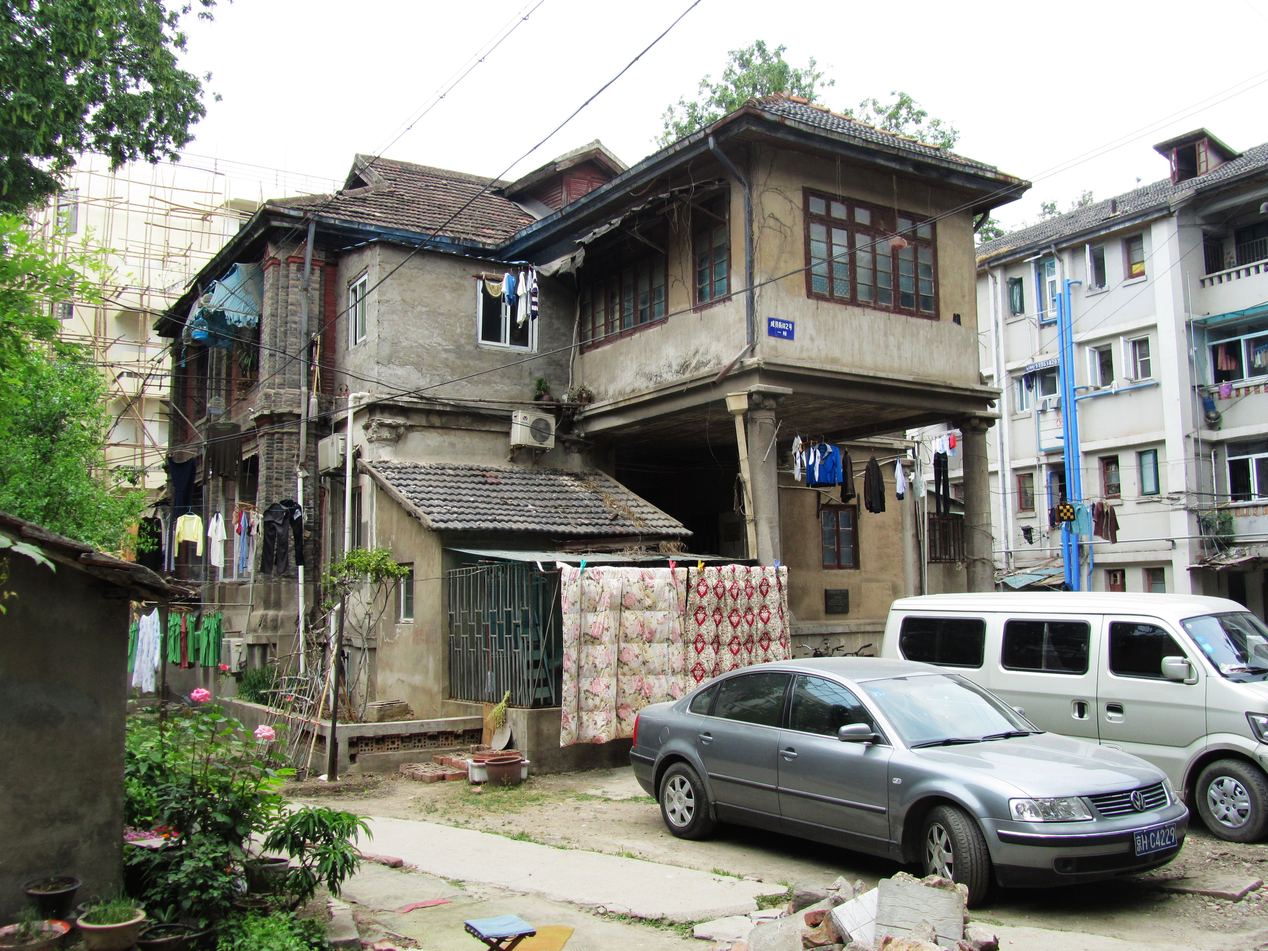 南京成賢街譚延闓故居全貌。